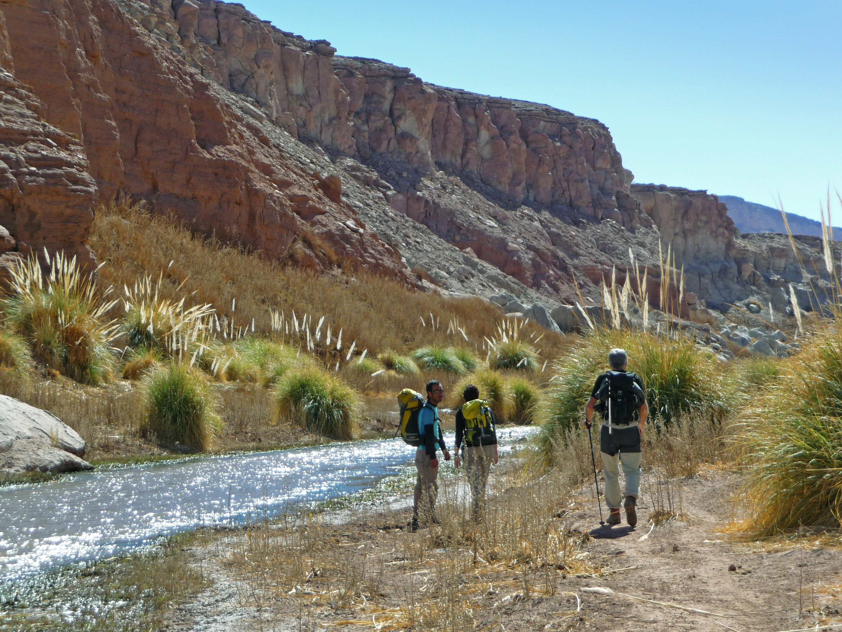 El rio San Pedro lleva mucha agua. San Bartolo, Atacama, Chile